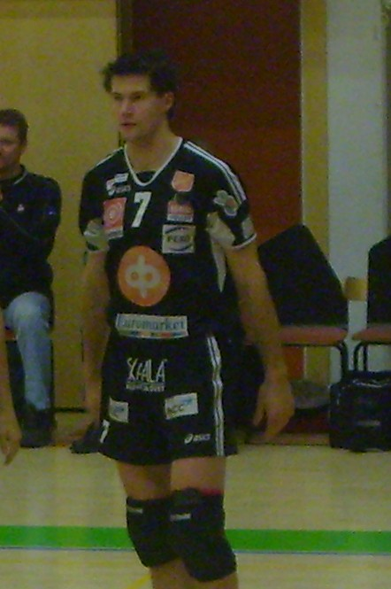 Jussi Savio SM-liigaottelussa kaudella 2008